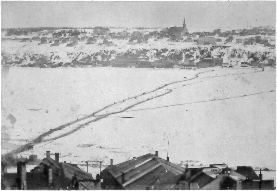 Le Pont de glace vu de la terrasse Durham, Québec, 1877, carte cabinet, albumine (cat. 359). « L'hiver, sur le fleuve Saint-Laurent, un solide pont de glace à deux voies, balisé de sapins, permet de relier les quais de Québec et de Lévis et, ainsi, de poursuivre durant la saison froide le transport des habitants, des marchandises et du courrier entre les deux villes. » Image et texte proviennent du livre de Mario Béland, Québec et ses photographes 1850-1908 -- La Collection Yves Beauregard, Québec : Musée national des beaux-arts du Québec, 2008, à la p. 207